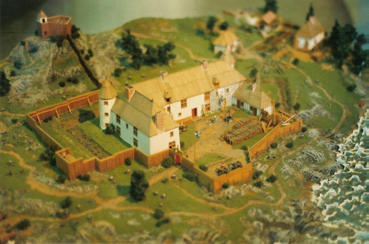 Habitation de Samuel de Champlain à Québec